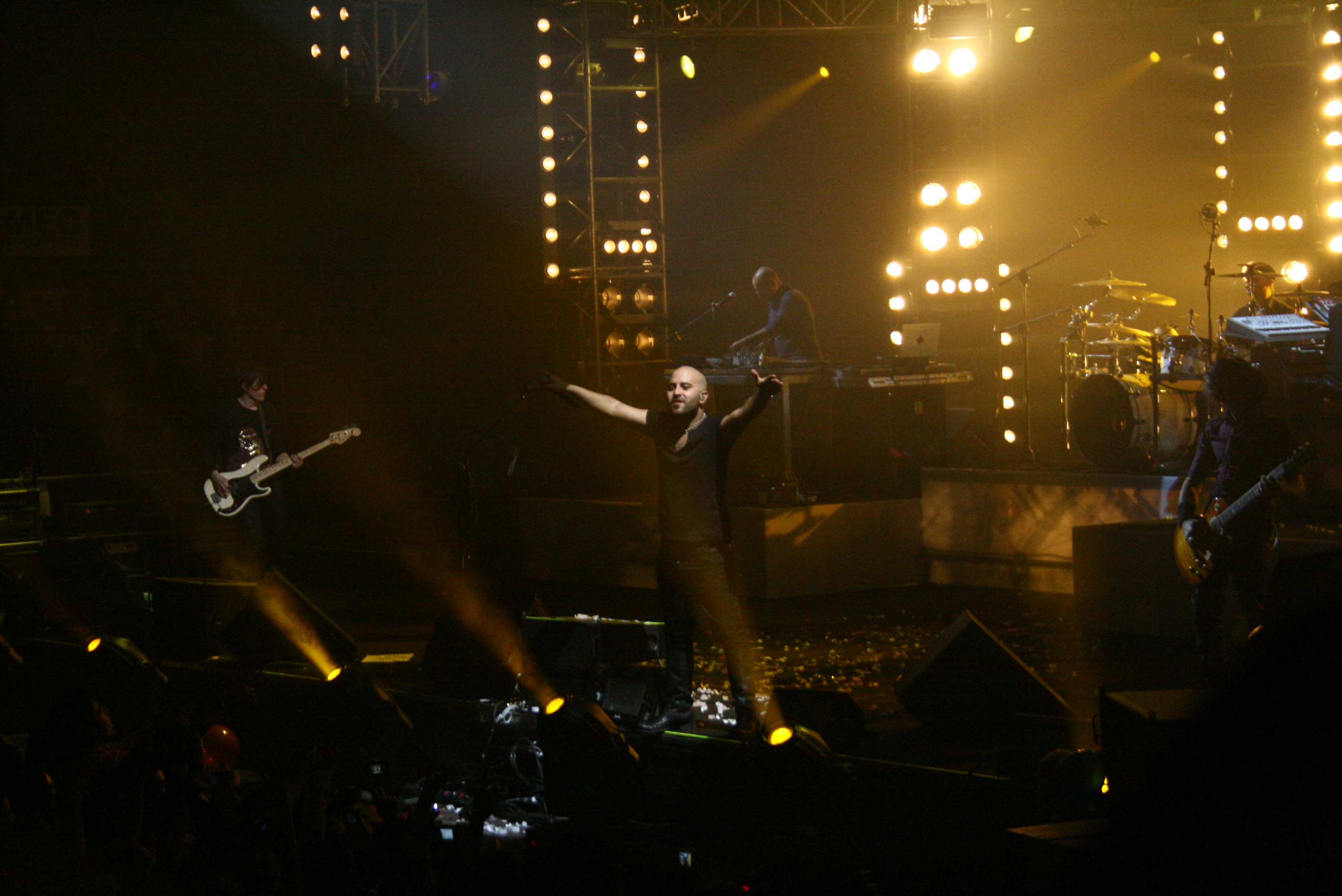 Il gruppo pop rock italiano negramaro in concerto a Caserta nel 2008